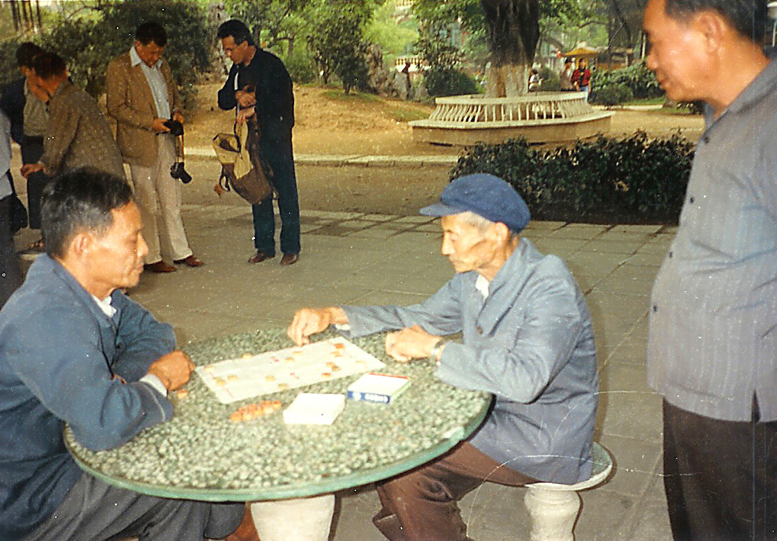 Chinesen vun der drëtter Generatioun beim Brietspill zu Guansghzou .